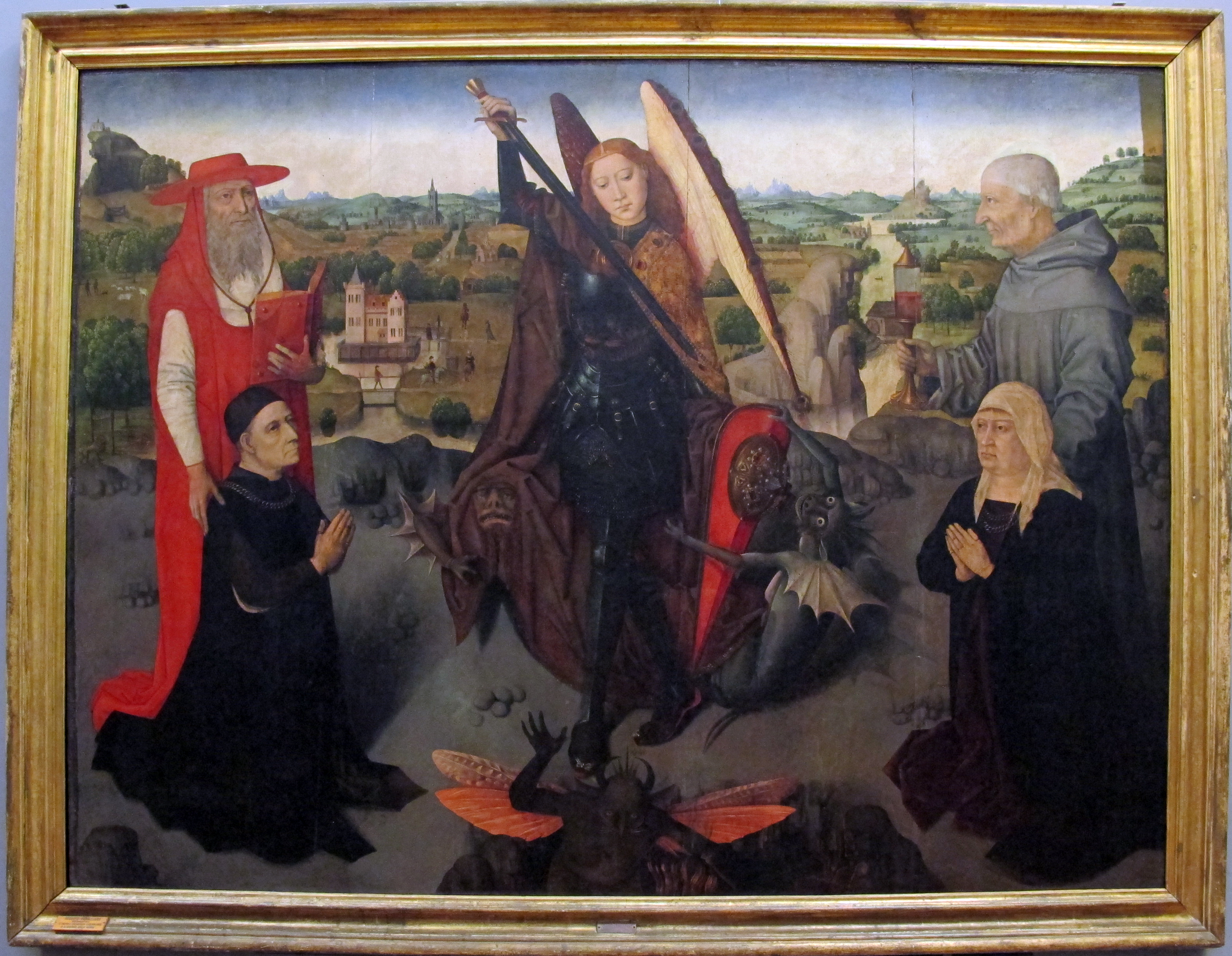 Galleria Napoletana (Museo di Capodimonte)